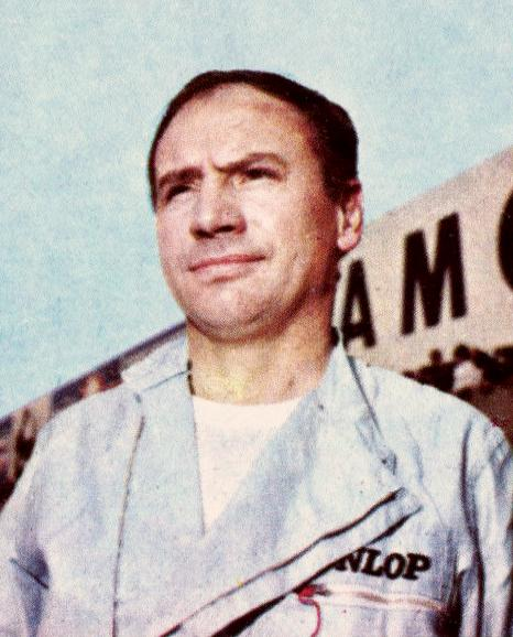 CAMPIONI DELLO SPORT 1966/67 - Figurina/Sticker n. 76 - W. MAIRESSE -Rec